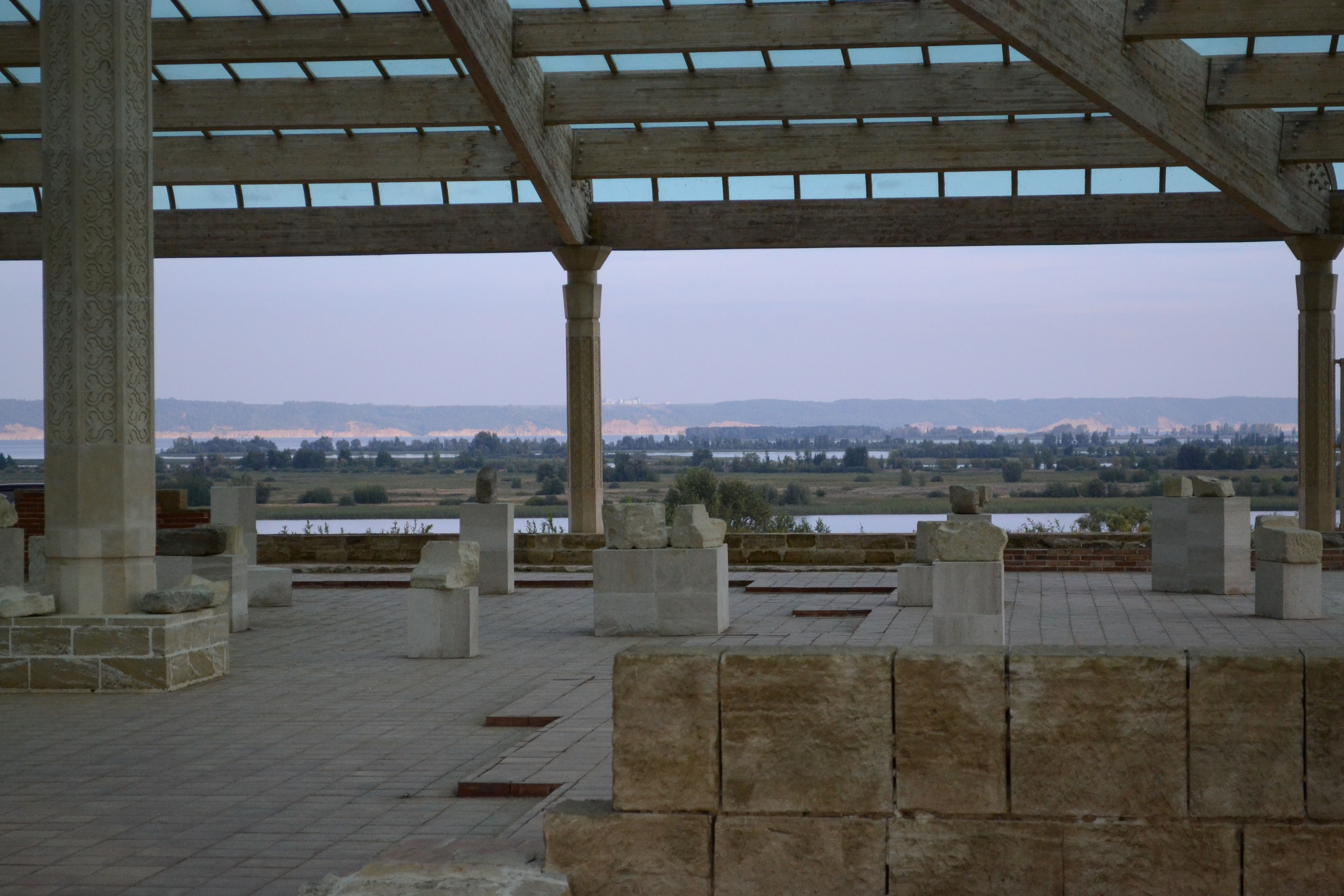 Городище Великие Булгары, Спасский район This image is related to the protected area of Russia number 1600162